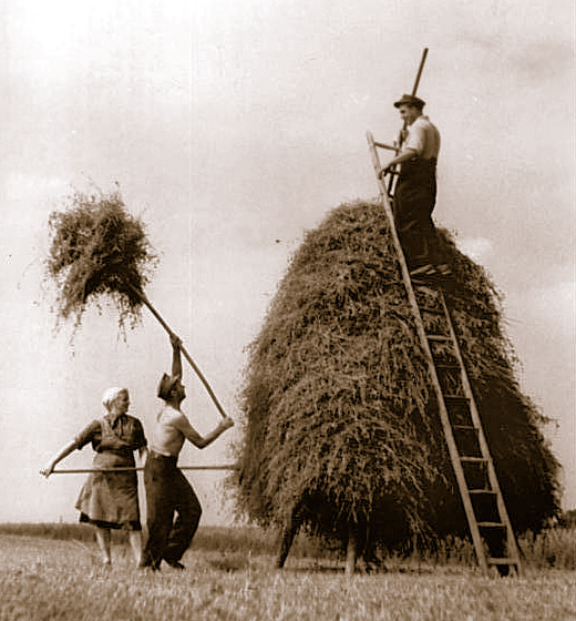 Langenweddingen, Heuernte, Trocknung Zentralbild Biscan-Wtj. 21.6.1954 Heu - richtig getrocknet - ist nährstoffreicher. Die Verbesserung der Futtergrundlage ist Voraussetzung für Steigerung der Viehbestände, Steigerung der Viehbestände bedeutet aber: mehr Milch, mehr Futter, mehr Fleisch. Eine einfache und wirkungsvolle Massnahme zur Steigerung der Grünlanderträge ist die Trocknung des Futterheues auf Gerüsten, auch "Reutern" genannt. Mehr Eiweiss und Stärke kann durch das Reutern dem Futter erhalten werden, als bei der sonst gebräuchlichen Bodentrocknung. UBz: "Eine lohnende Mehrarbeit", nennt der werktätige Einzelbauer Otto Denker in Langenweddingen das "Reutern" des Heues. Die Mühe des Baues der Trockengerüste wird durch höhere Leistungen der mit nährstoffreichem Heu gefütterten Kühe wieder wettgemacht.